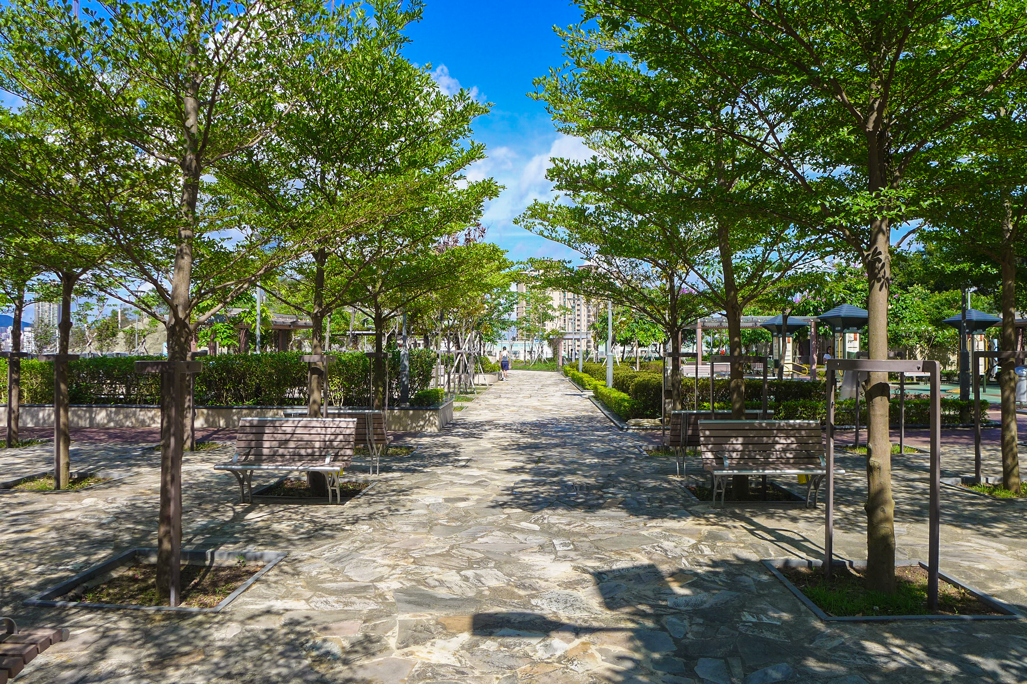 Chung Yee Street Garden Open space